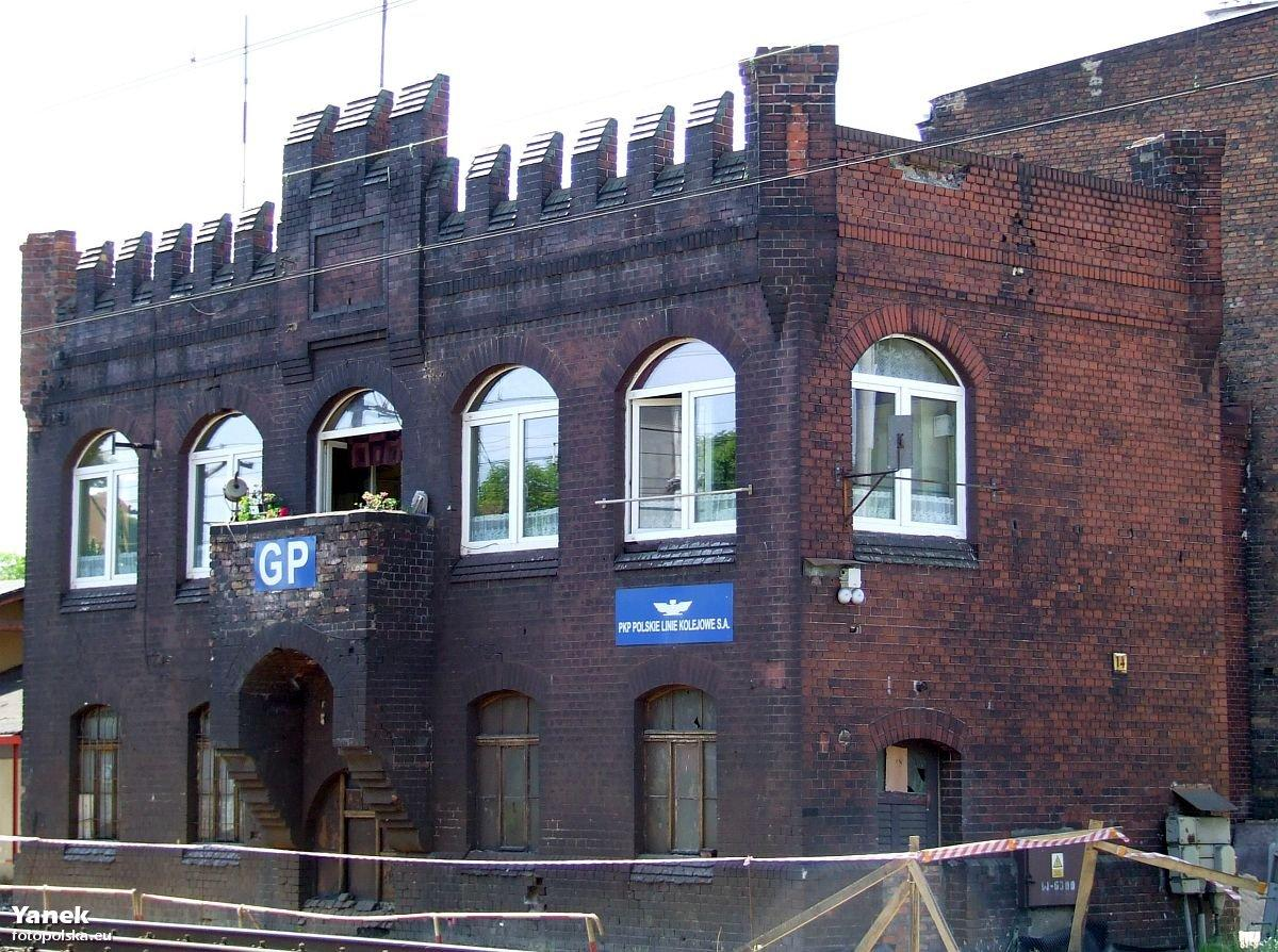 Gdańsk Orunia. Strażnica kolejowa GP na przejeździe ul. Sandomierskiej.